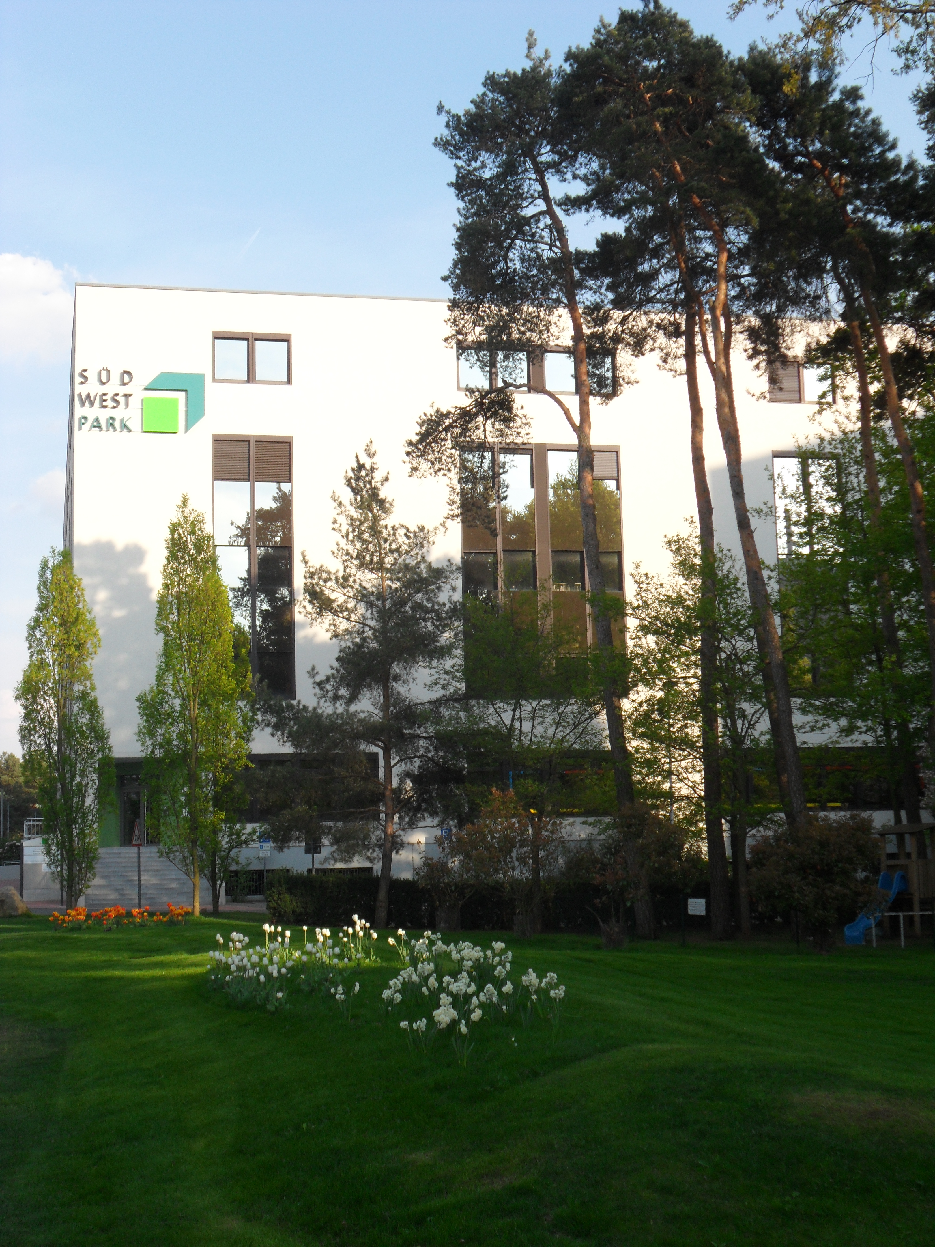 siehe Bildtitel